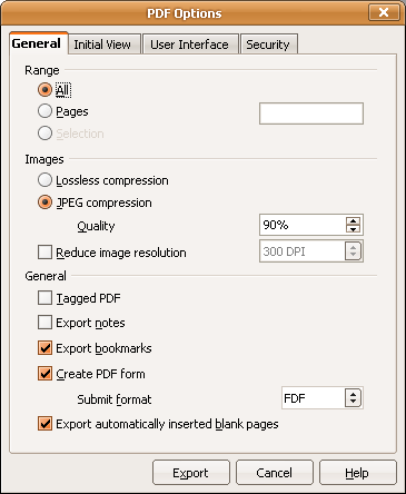 Export to PDF dialog